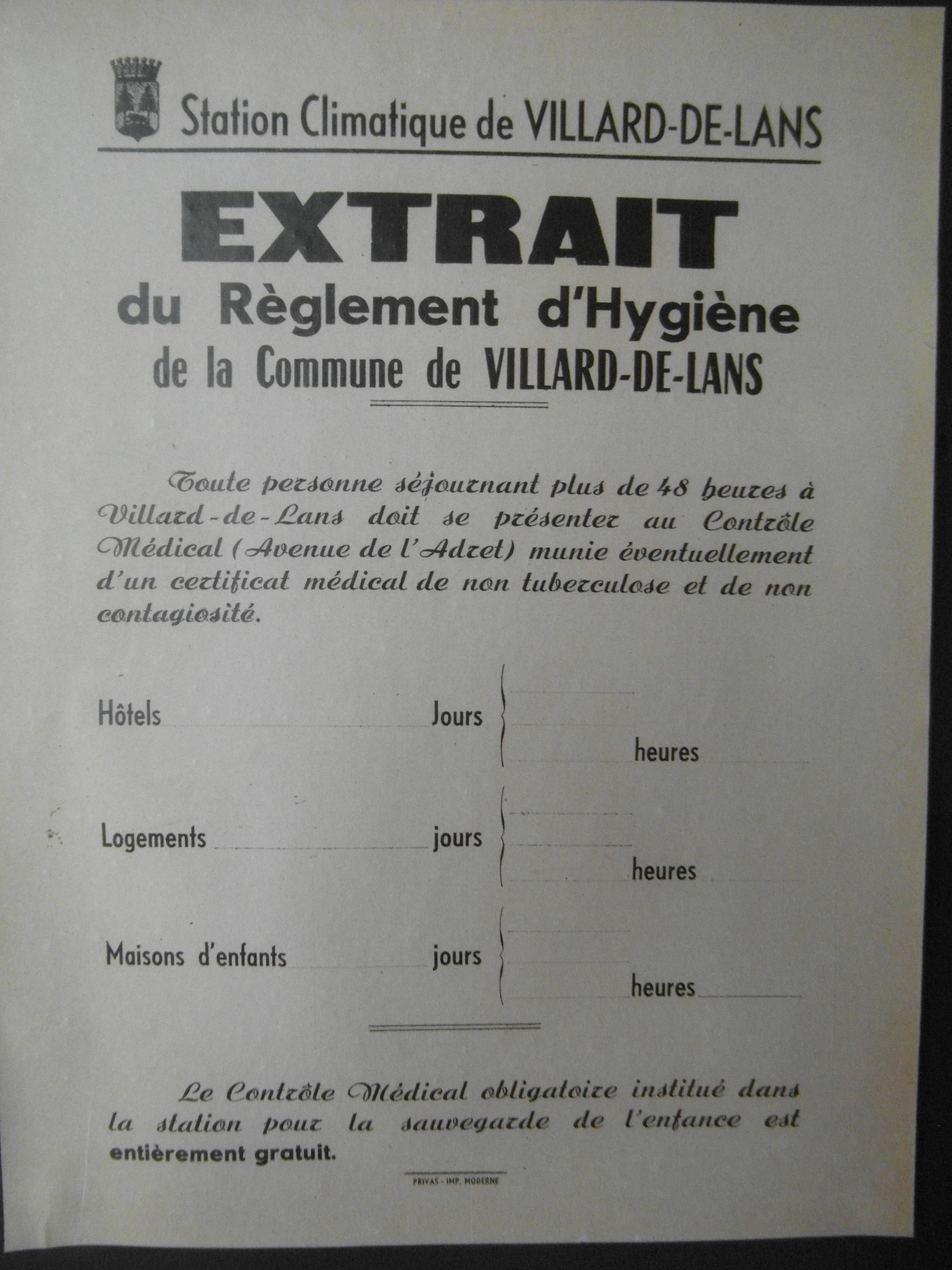 Affiche municipale de Villard-de--Lans des années 1930